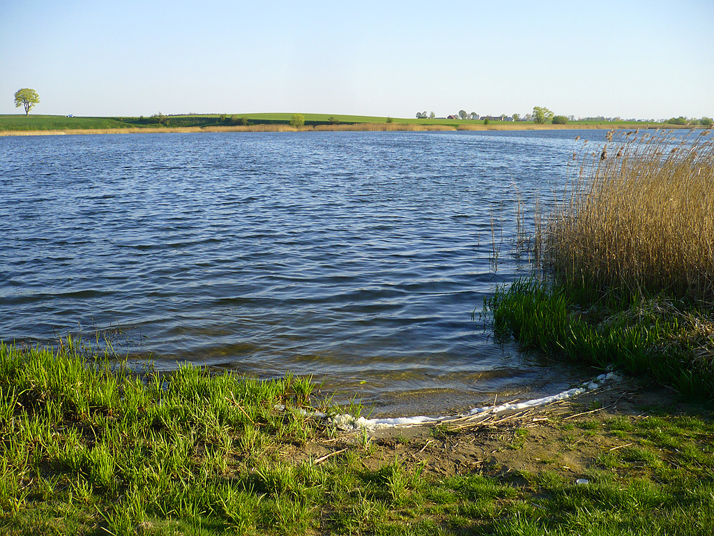 Jezioro Mełno przebiegające przez Jasiewo